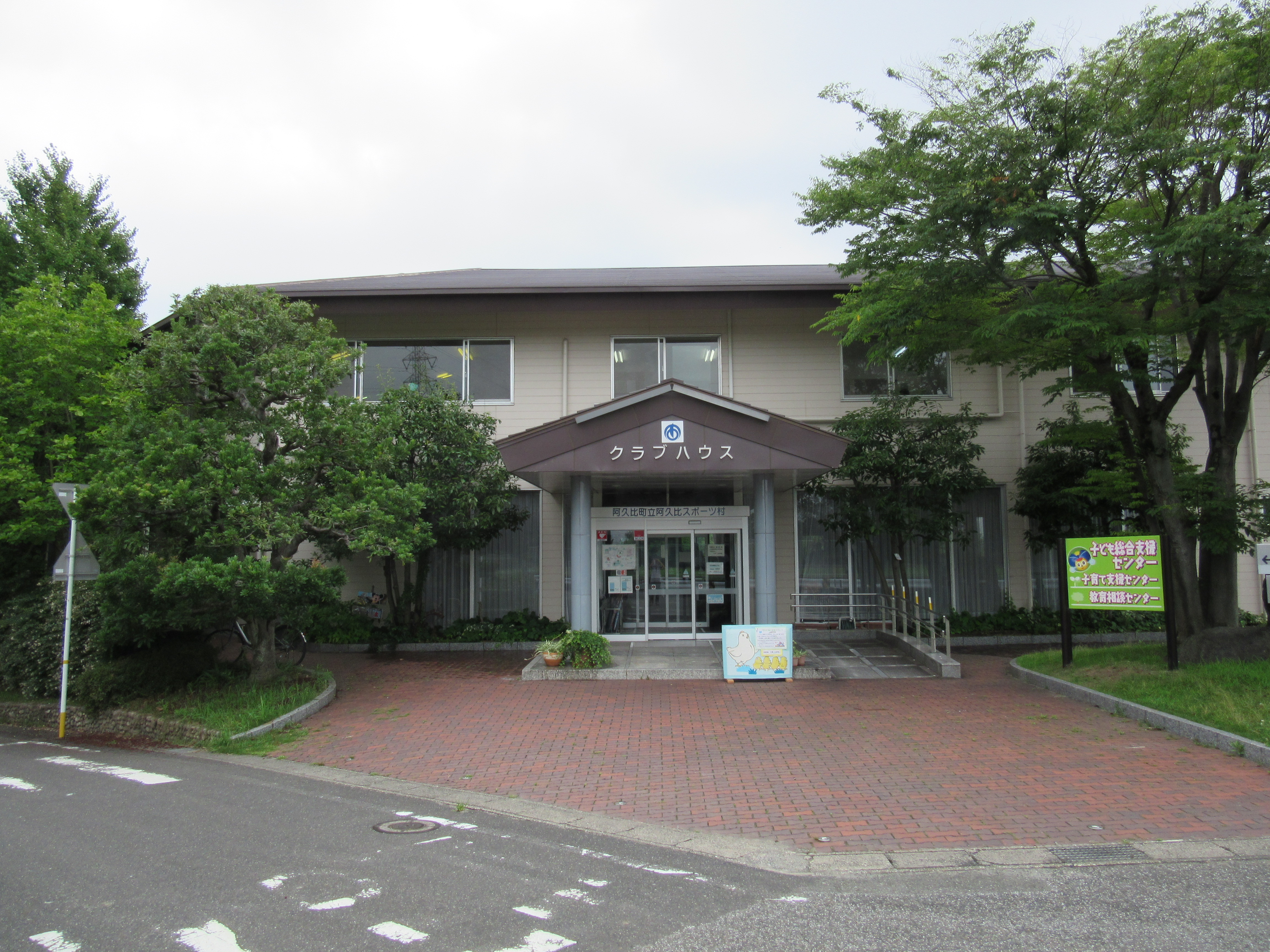 阿久比球場クラブハウス